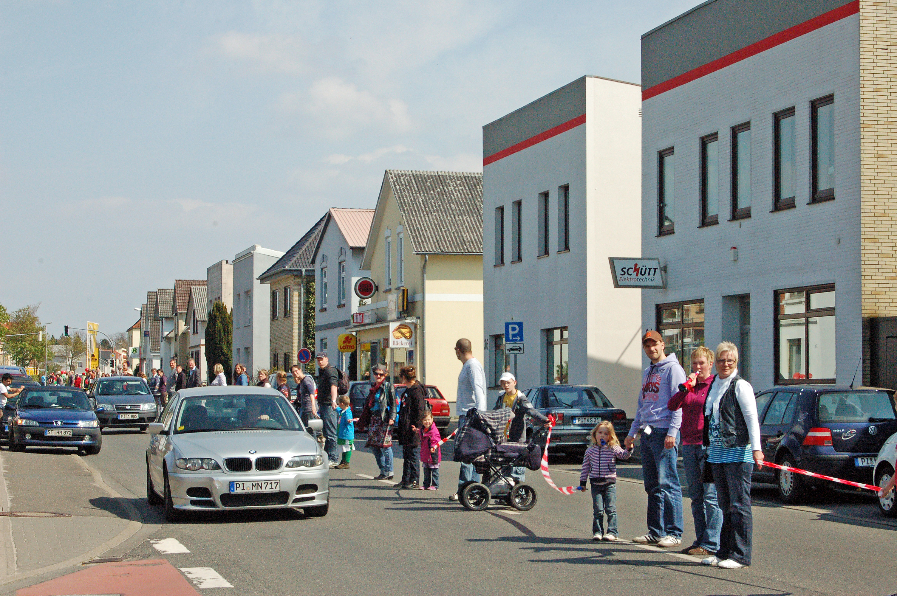 Aktions- und Menschenkette "KETTENreAKTION" in Uetersen am 24. April 2010